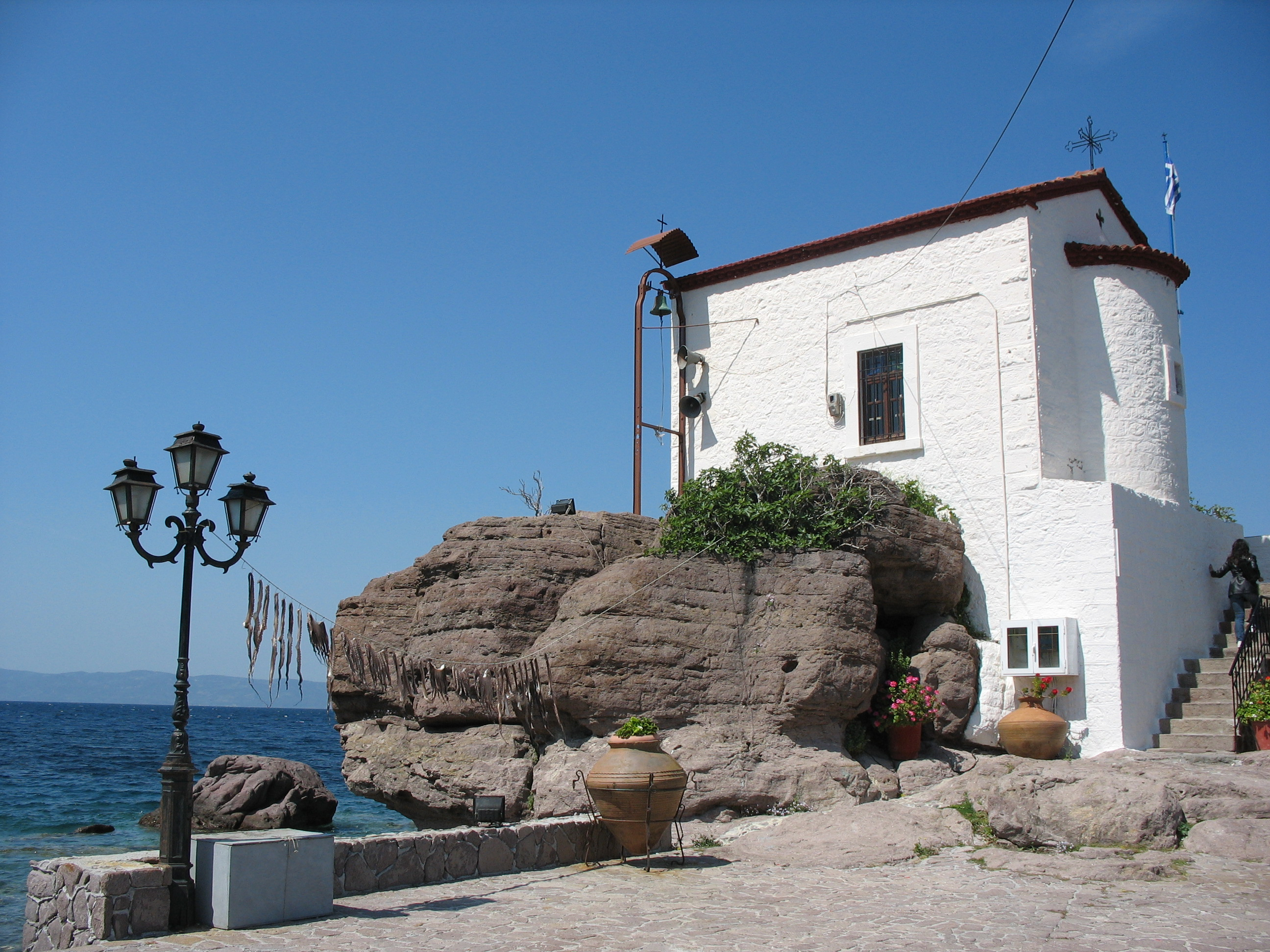 Panaya Gorgona sti Skamia